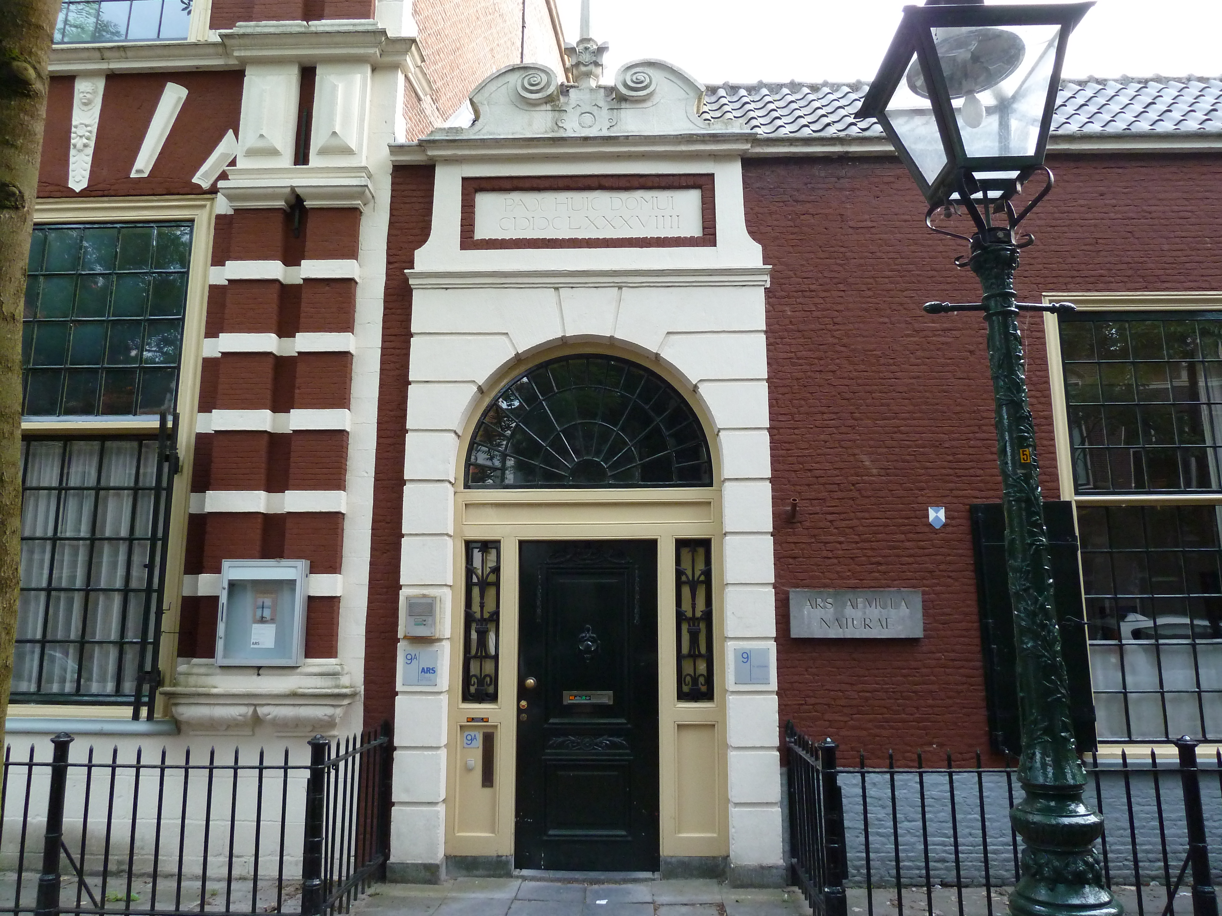 Pieterskerkgracht 9, Leiden, NL. Toegangspoort Ars Aemula Naturae